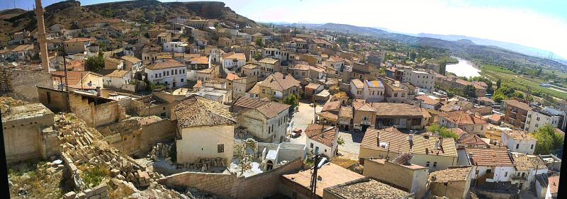 Avanos'un panoraması. (A panorama of Avanos in Nevşehir, Cappadocia, Turkey).